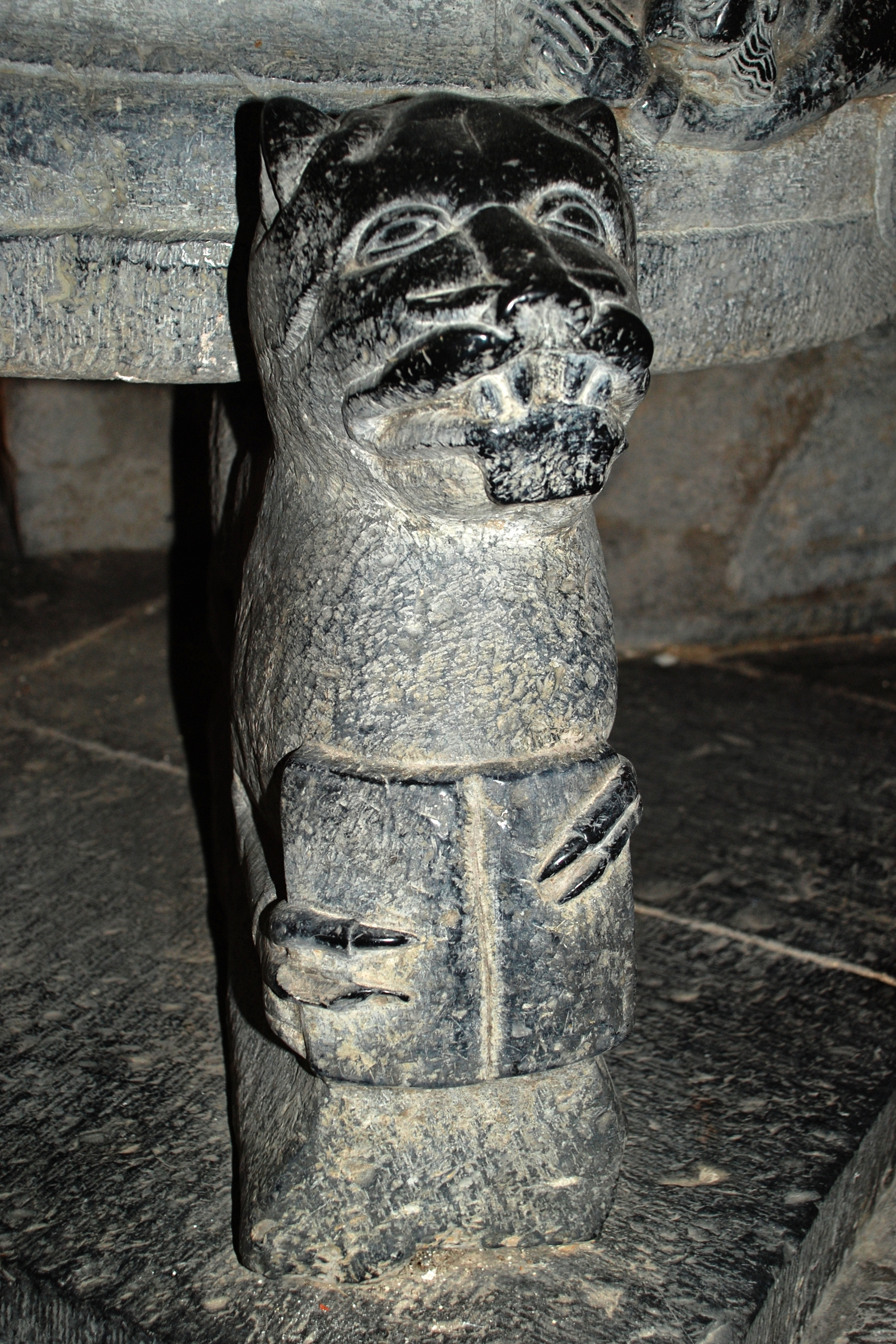 Belgique - Province de Namur - Fonts baptismaux de Furnaux - Lion tenant le livre de la foi